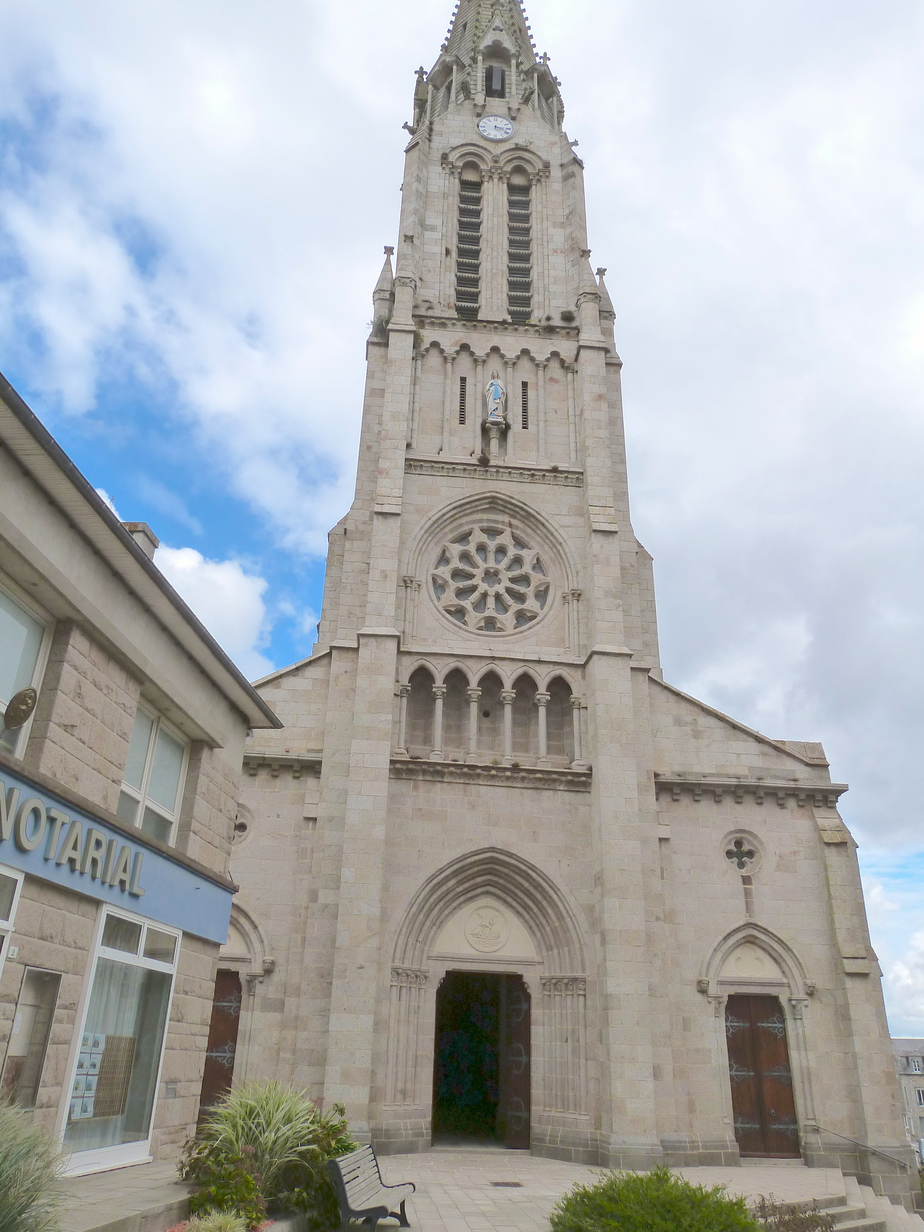 Eglise Notre-Dame de Pleudihen-sur-Rance